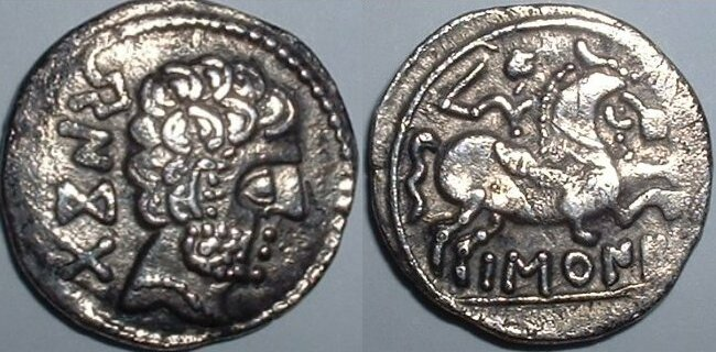 Anverso y reverso del Denario (moneda íbera) con la inscripción Barscunes. Denario (moneda ibérica) de la ceca de Barscunes (Pamplona o Rocafort) del siglo I o II antes de Cristo